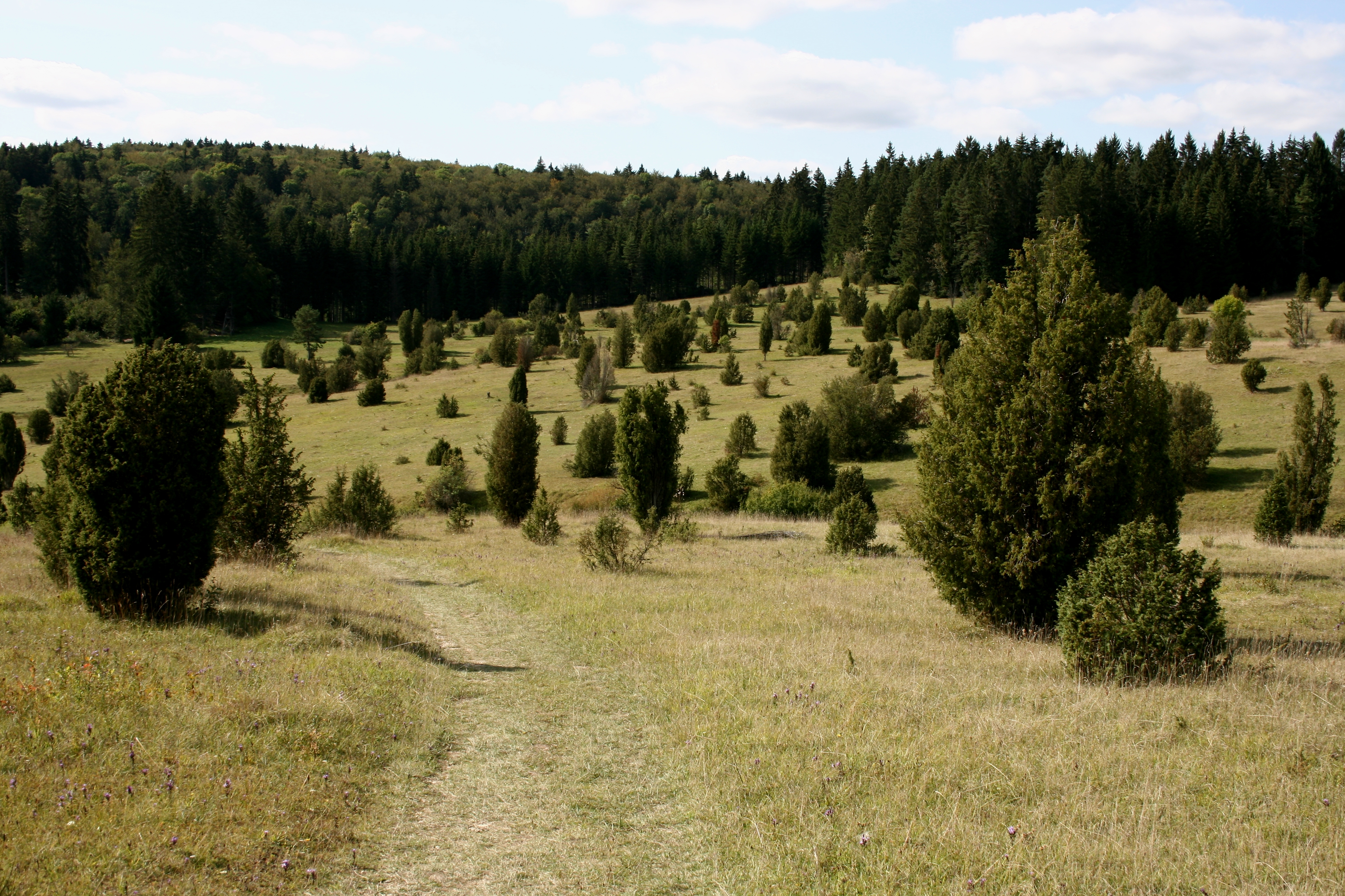 Das 121 Hektar große Naturschutzgebiet Digelfeld bei Hayingen im Landkreis Reutlingen schützt eine der größten Wacholderheiden der Schwäbischen Alb